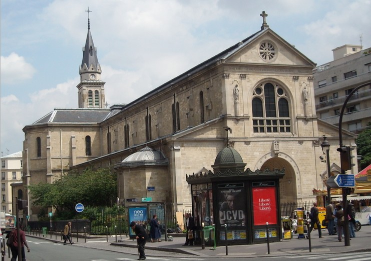 Église Notre Dame de Clignancourt vue du carrefour Ordener/Mont Cenis